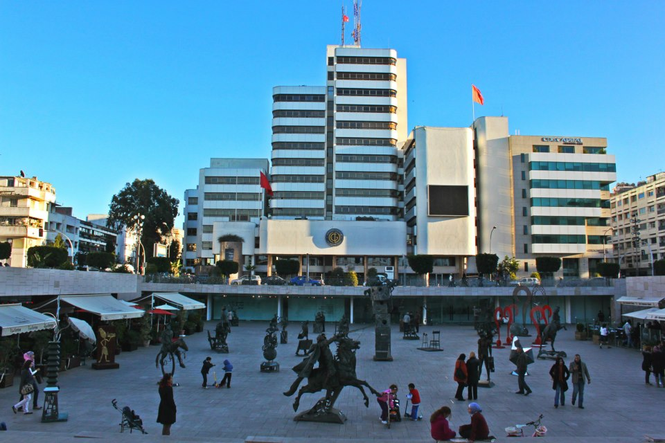 Pietri Square